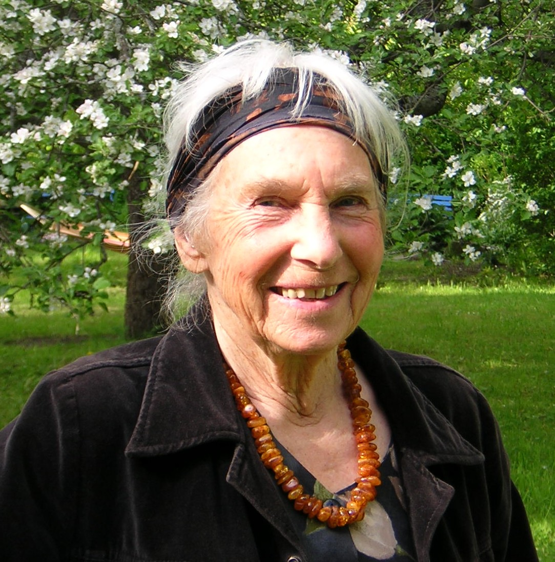 Konstnärinnan Kerstin Sandberg Bränngård i trädgården på Ornässtugan i Ulriksdal